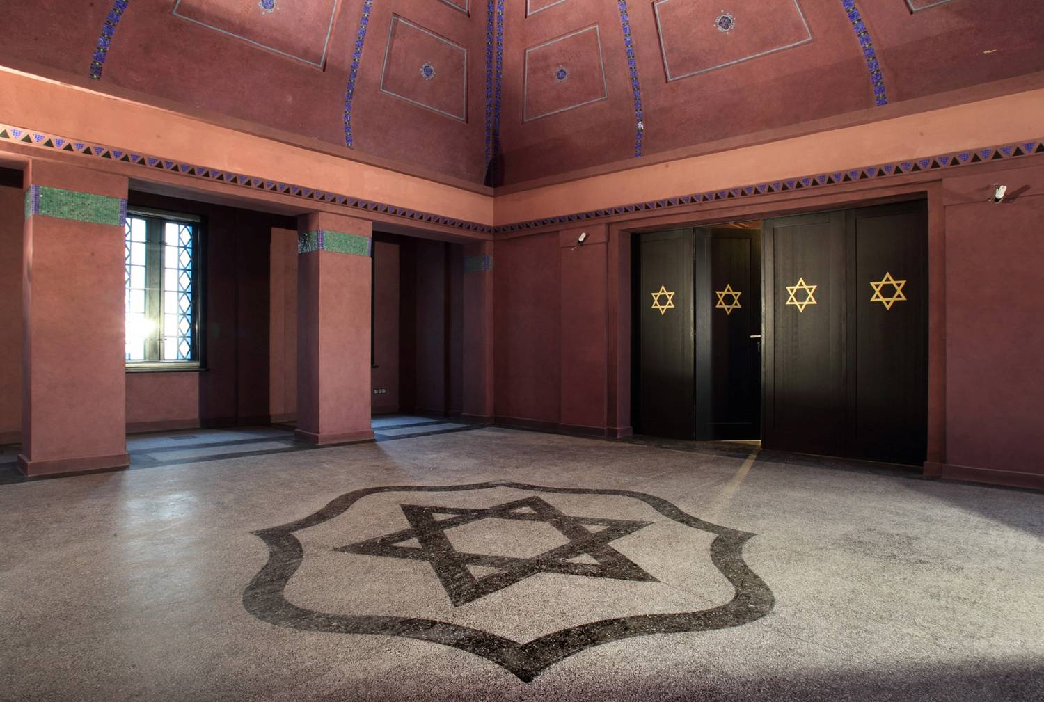 Innenansicht der Halle der Bet Tahara in Olsztyn nach der Restauration, 2012.